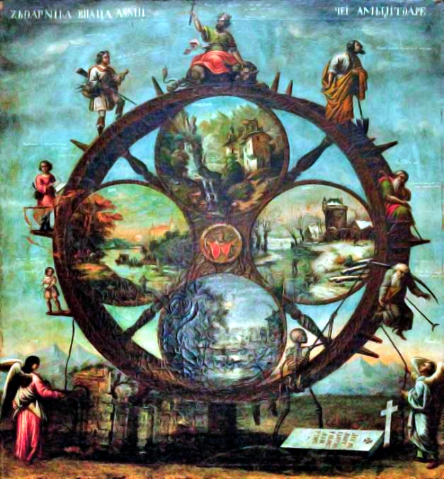 Nicolae Teodorescu - Roata lumii sau Roata vieții - Muzeul Episcopiei Buzăului şi Vrancei. „Tabloul Roata Vieţii sau Roata Lumii este o alegorie asupra vieţii omului. De la naştere şi până la moarte, omul este însoţit de îngerul păzitor, înfăţişat în tablou ca un tânăr care ţine în mână un fir – firul vieţii” - Gheorghe Petcu, în volumul ”Judeţul Buzău, Legende şi istorie”.